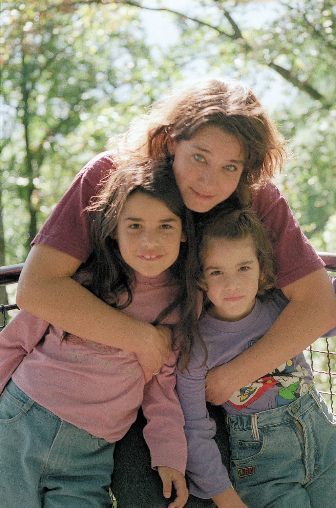 מתוך הסרט "המחבל שלי" של יולי כהן